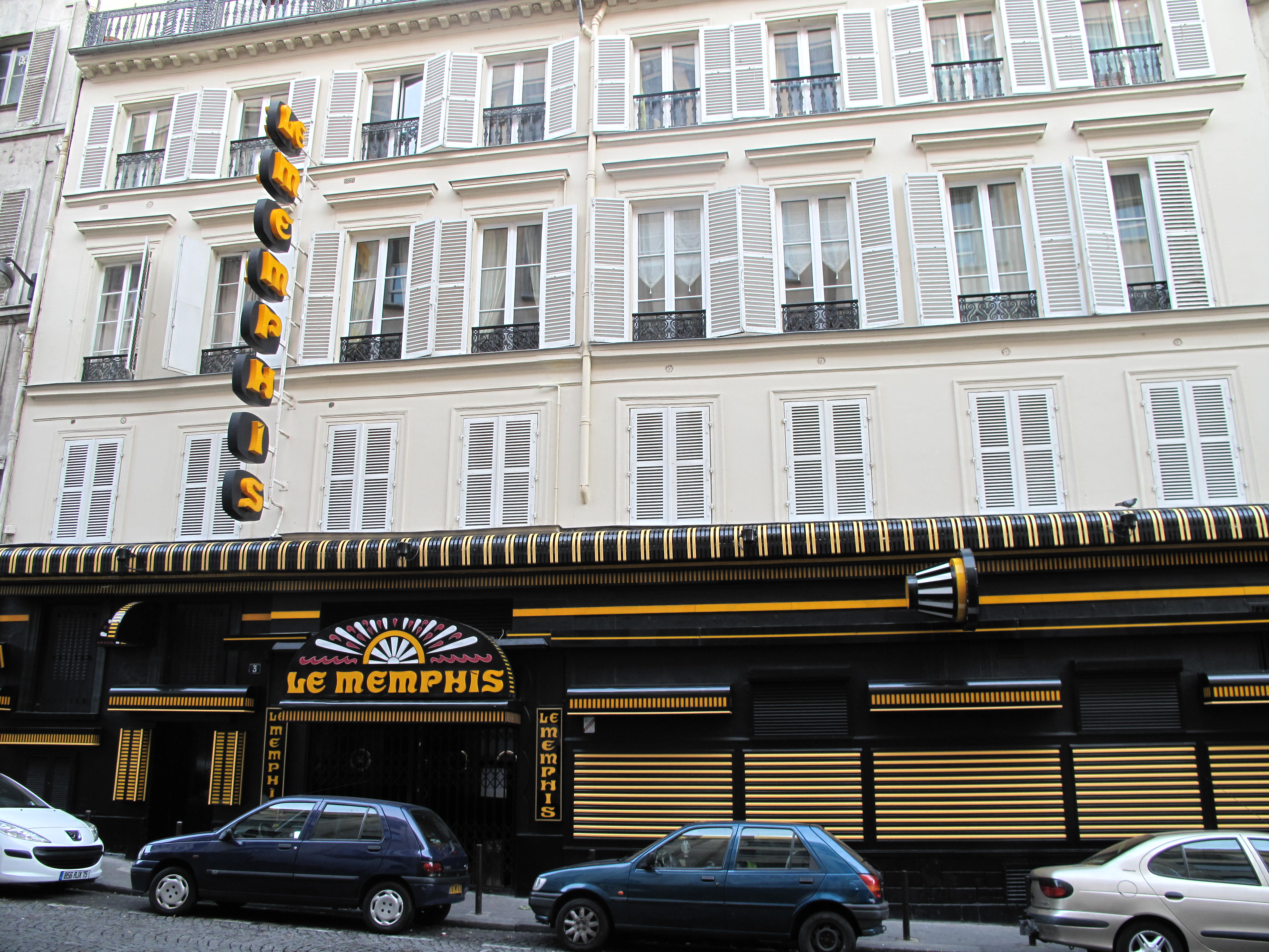 Night Club "Le Memphis" : 4 impasse Bonne Nouvelle, Paris 10e arr.